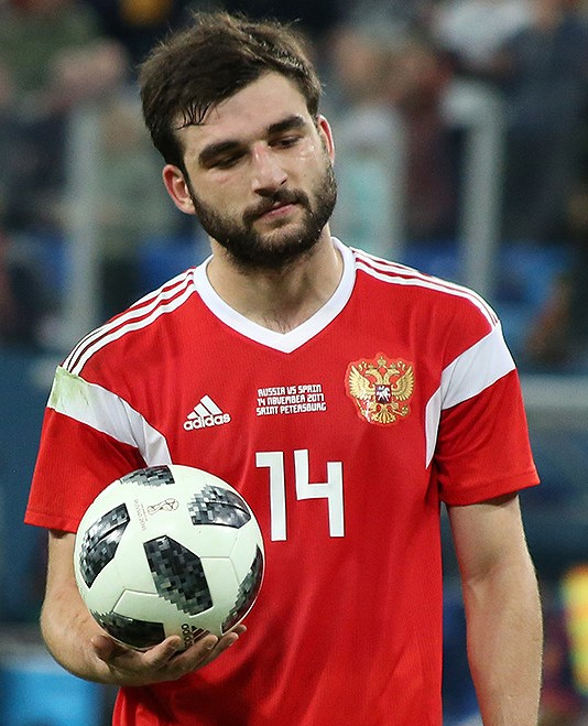 Georgi Dzhikiya, Denis Glushakov